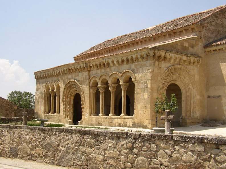 Segovia. (Castilla-León. España) Sotosalbos. Iglesia románica. Fotografía realizada el 22 julio de 2003 por el autor.User:Pelayo2.